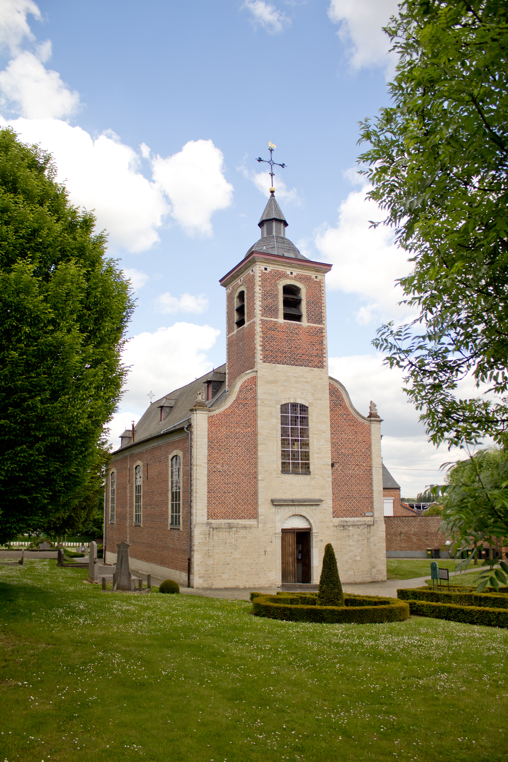 Parochiekerk Sint-Martinus met beschermd orgel, Wilsele.